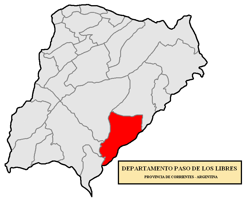 Localización del Departamento Paso de los Libres en la provincia de Corrientes, Argentina Localización del Departamento Paso de los Libres, en la provincia de Corrientes, Argentina.